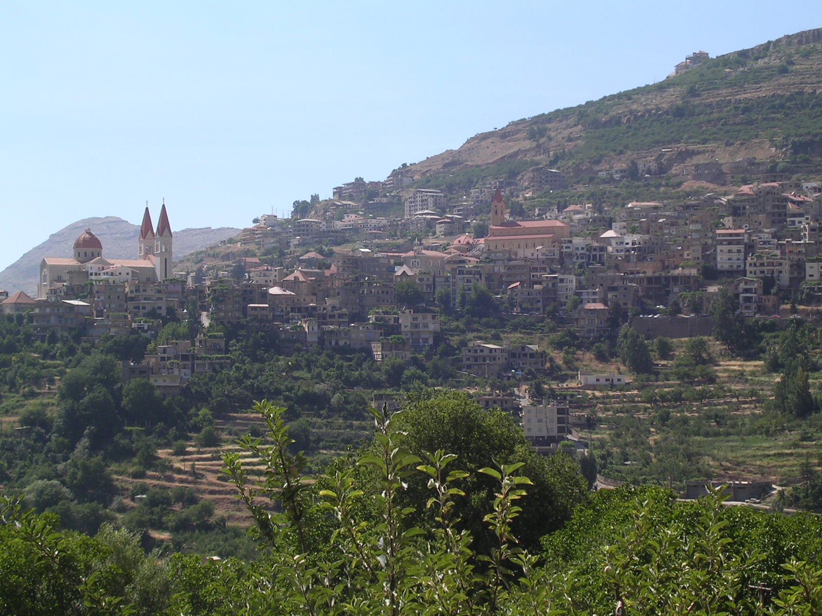 Bsharri (Lebanon)